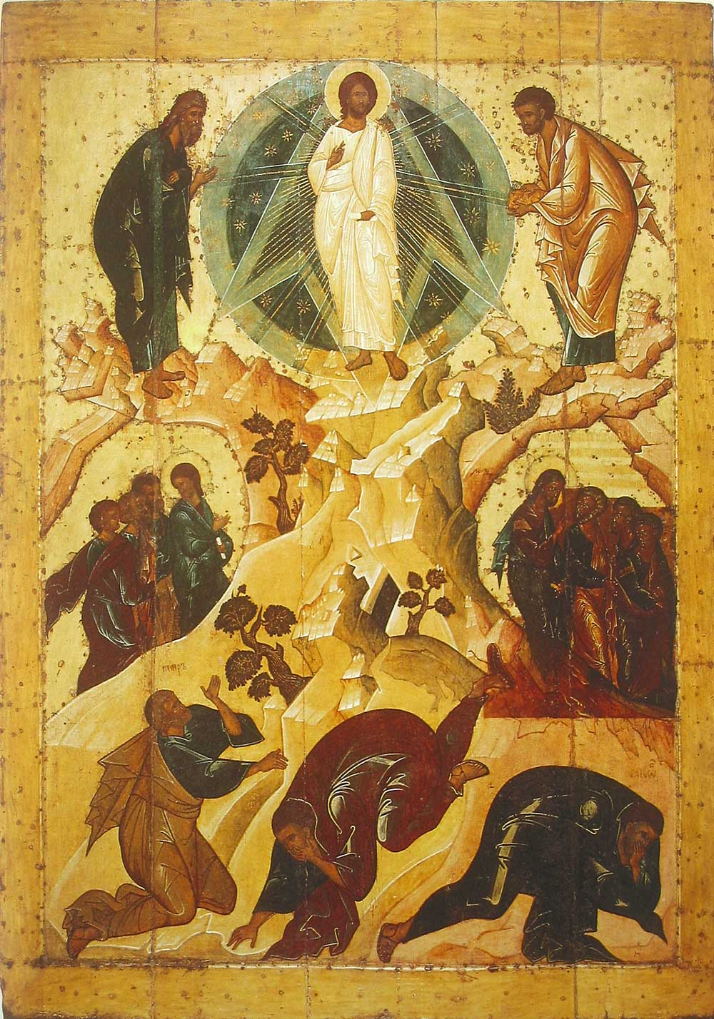 Преображение Школа или худ. центр: Ярославль Ок. 1516 г. 164 × 119 см Ярославский историко-архитектурный и художественный музей заповедник, Ярославль, Россия Инв. 40943 Принято считать, что по иконографии данный образ повторяет икону "Преображение" из Спасо-Преображенского монастыря в Переславле-Залесском, от которой отличается рядом деталей. Происходит из Спасо-Преображенского собора Спасского монастыря в Ярославле, где являлась храмовым образом.